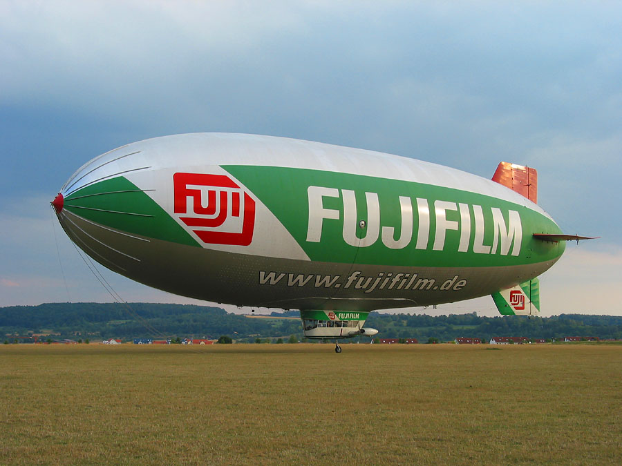 D-LDFO im Juli 2003